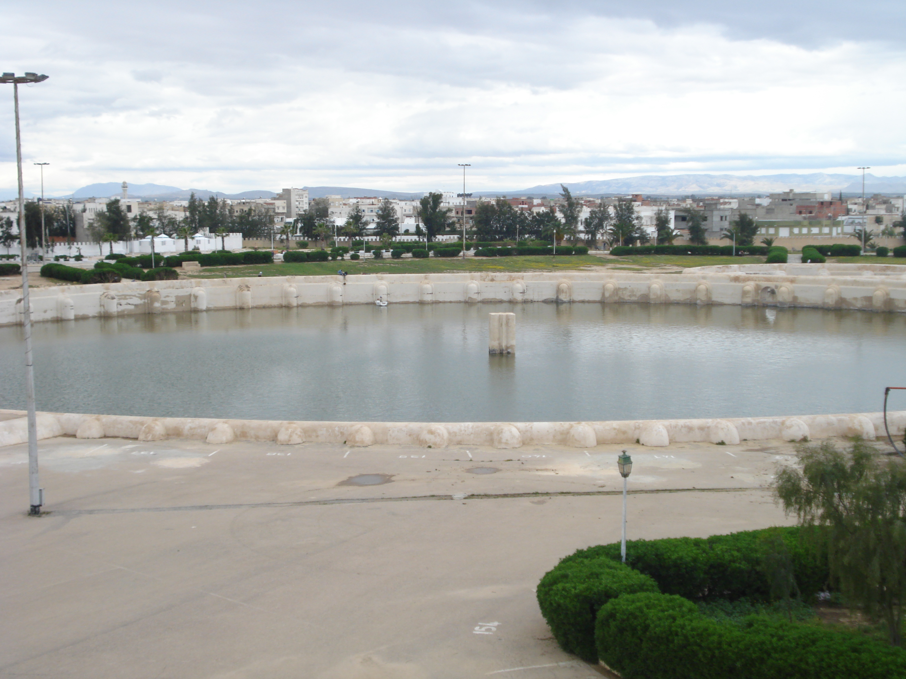 Une des deux citernes du bassin des Aghlabides